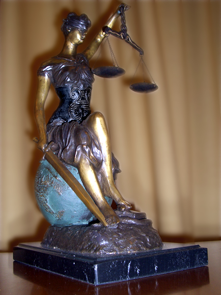 アメリカ司法省により225周年記念で作られたブロンズ像。